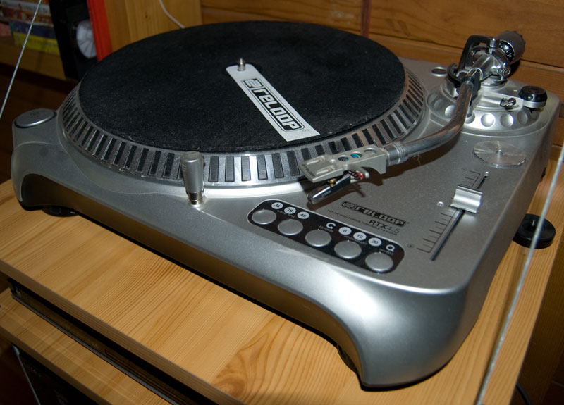 Грамофон Reloop RTX 4.5